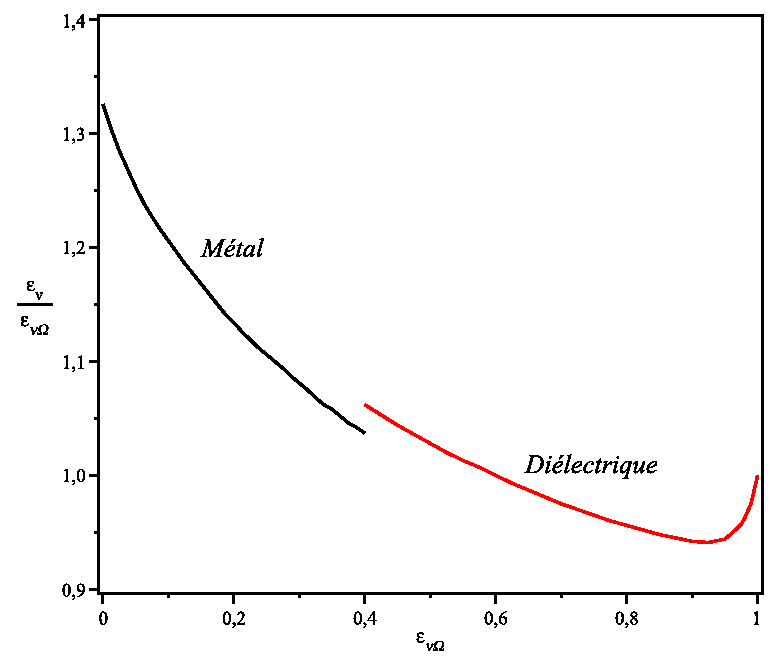 Relation donnant l'émissivité hémisphérique en fonction de la valeur directionnelle.